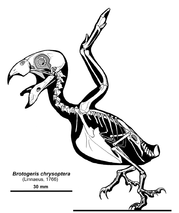 Golden-winged parakeet skeleton diagram.